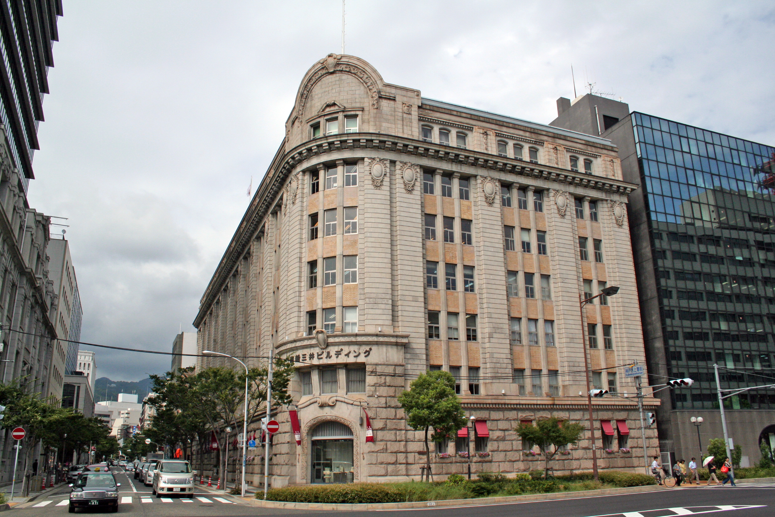 兵庫県神戸市中央区にある神戸市立博物館やその南を通る国道2号線(海岸通)沿いの町並み。 商船三井ビル。